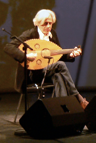 Roman Bunka mit Dissidenten bei Verleihung Praetorius Musikpreis 2012